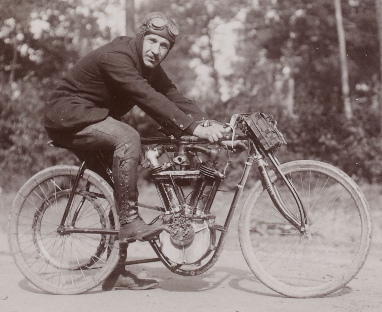 [Collection Jules Beau. Photographie sportive] : T. 28. AnnÃ©e 1904 / Jules Beau : F. 13. [Mille arrÃªtÃ©, kilomÃ¨tre lancÃ©, Dourdan, usines Gautreau]; Depicted person: Vincenzo Lanfranchi